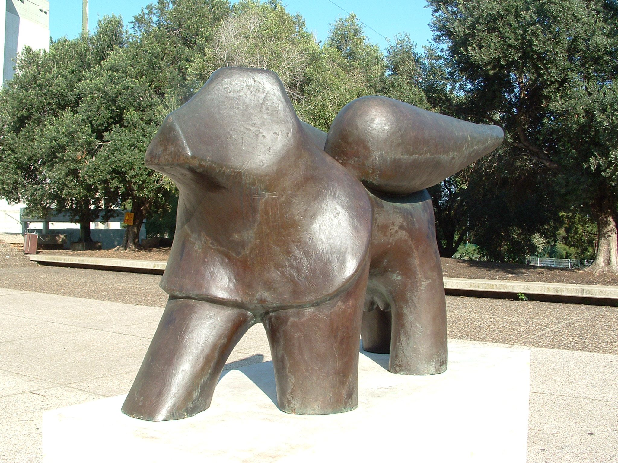 The statue - Winged Lion. It was sculptured by Amos Kenan. In front of the Sport Center- Haifa, Israel הפסל "אריה מכונף". הפסל הוא עמוס קינן. הפסל הוצב בחזית היכל הספורט בשכונת רוממה בחיפה